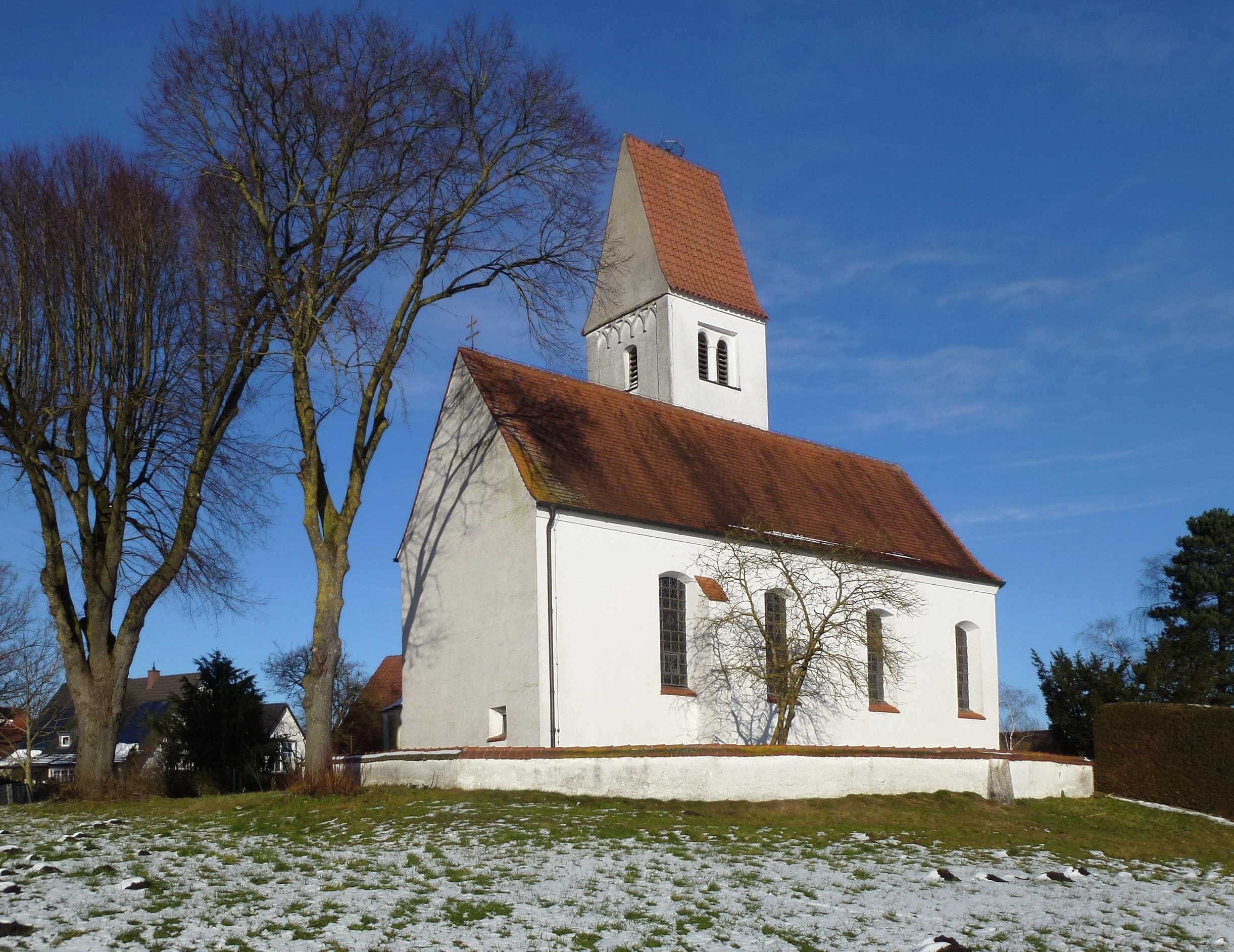 Bergkirchen - OT Feldgeding: St.Augustin mit Friedhofsmauer aus dem 17./18. Jahrhundert. Ansicht von SW